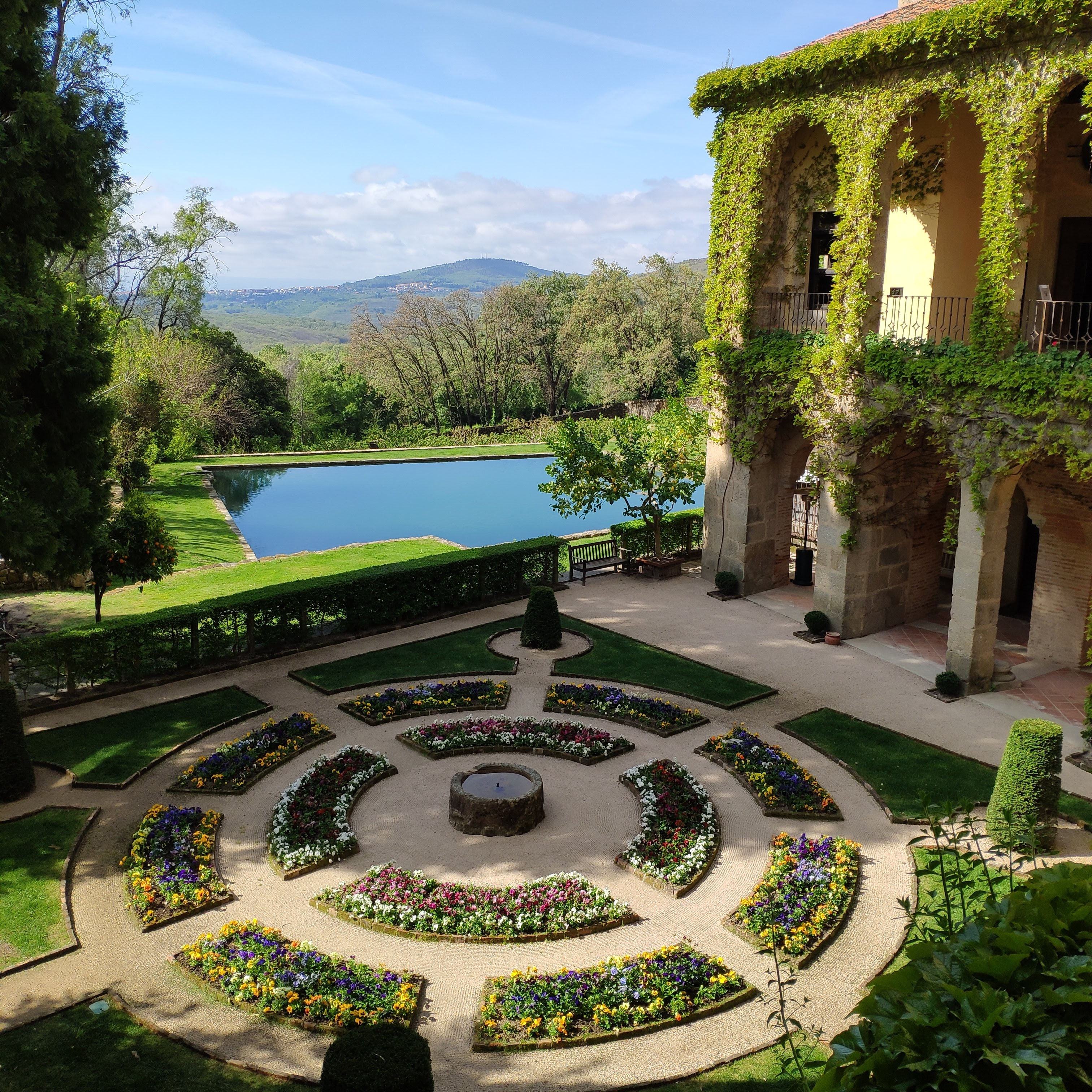 Jardín del monasterio de Yuste, Cuacos de Yuste, Cáceres